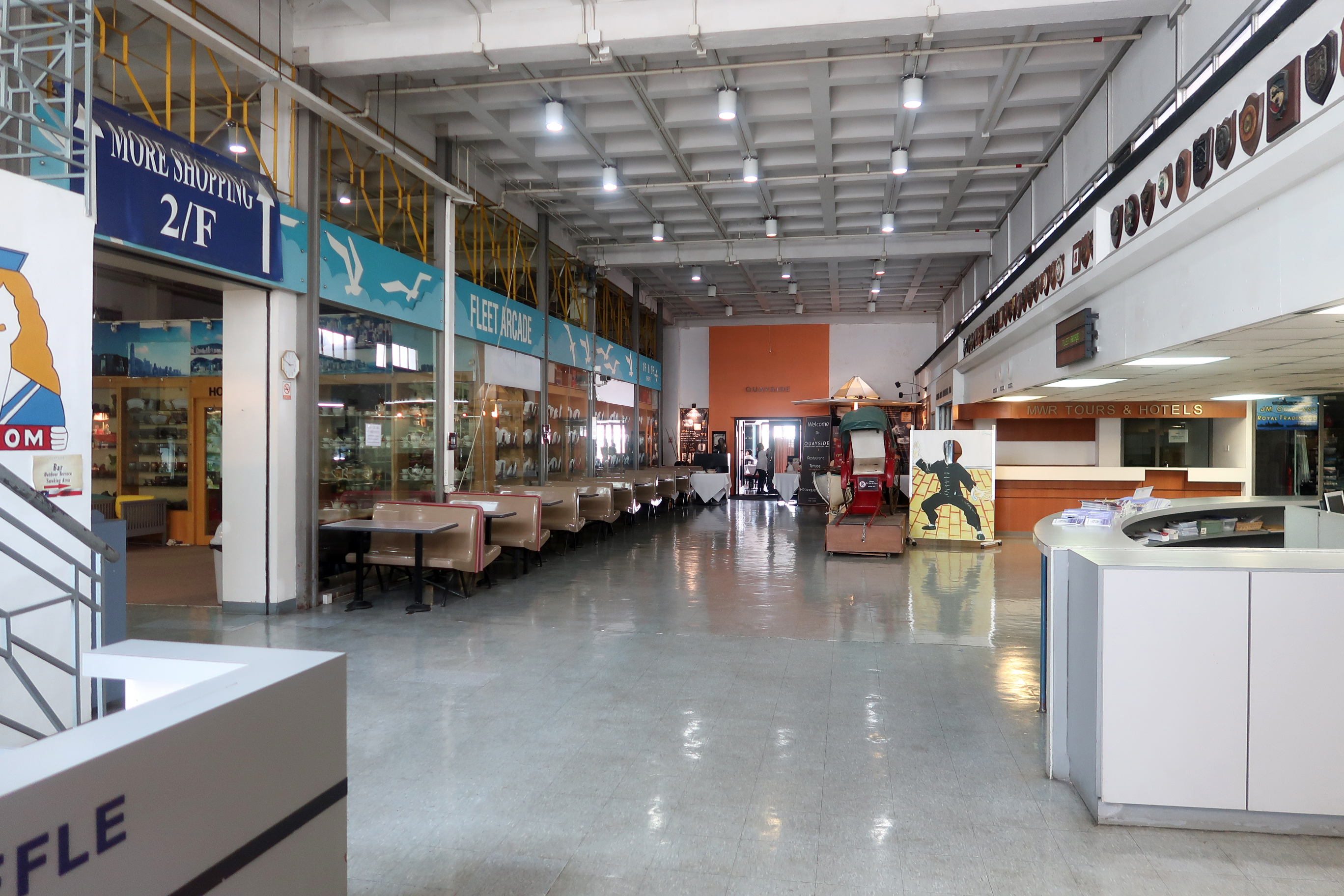 Fleet Arcade